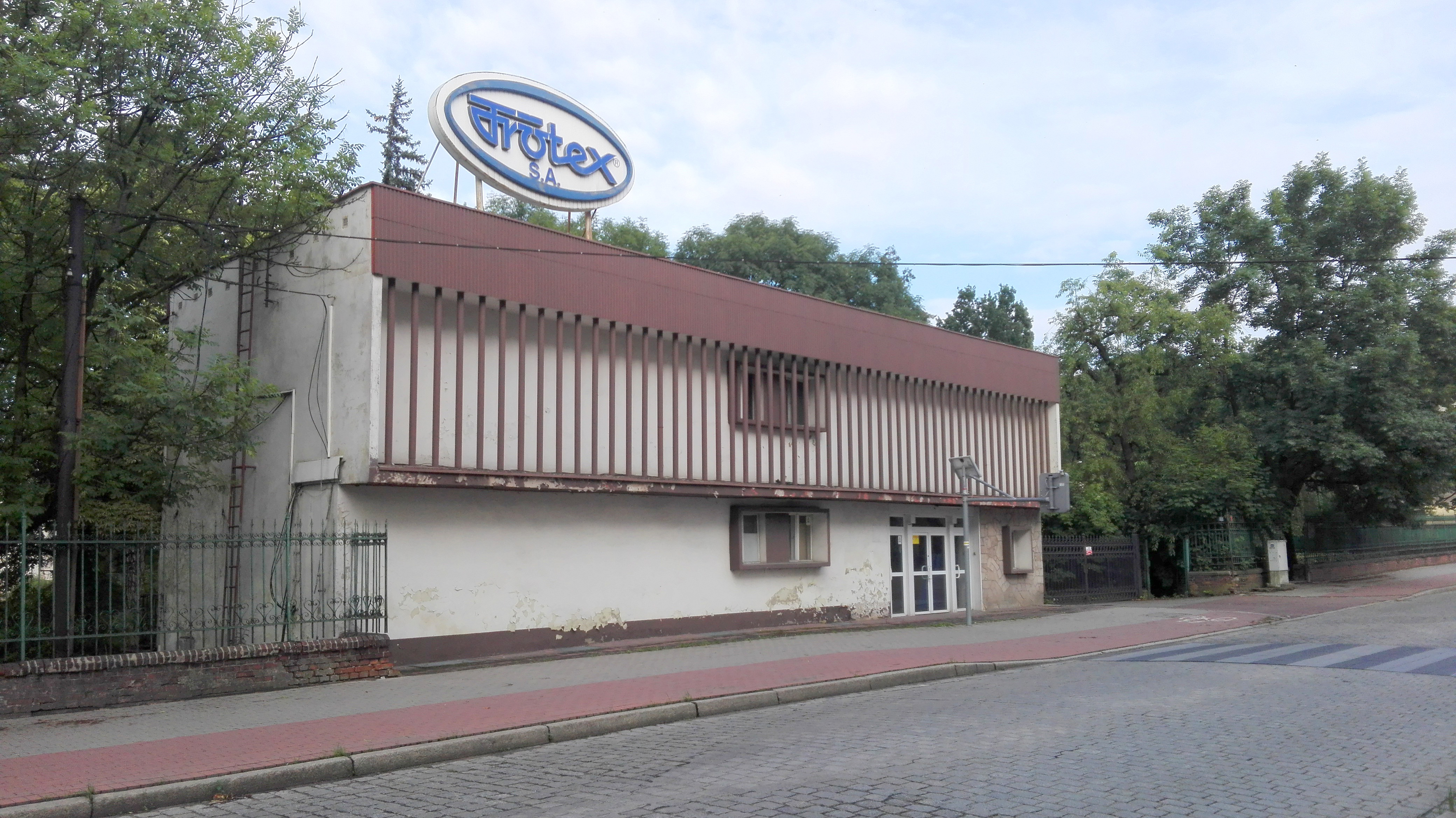 Prudnik - byłe Zakłady Przemysłu Bawełnianego „Frotex“ S.A.